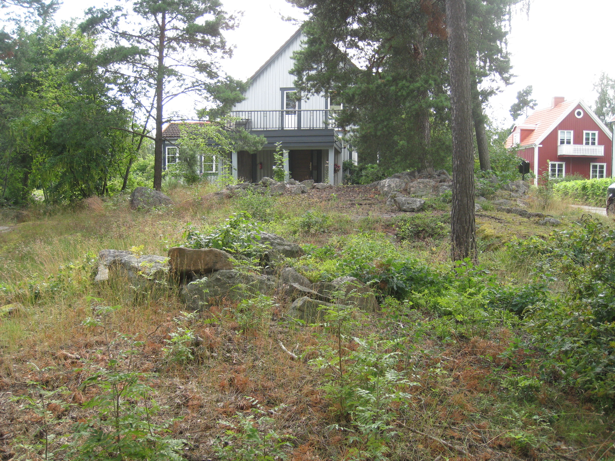 Bronsåldersgravfält RAÄ4 vid Kämpakumlet på Aladdinsvägen 32 inom Smedslättens område i Bromma väster om Stockholm.